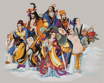 Das Bild zeigt die beliebtesten Heiligen Chinas: Lu Dong Bin, Li Die Guai, Zhang Guo Lau, Cao Guo Jin, Han Xian Zi, Zhong Li Quan, Lan Cai He und He Xian Gu.